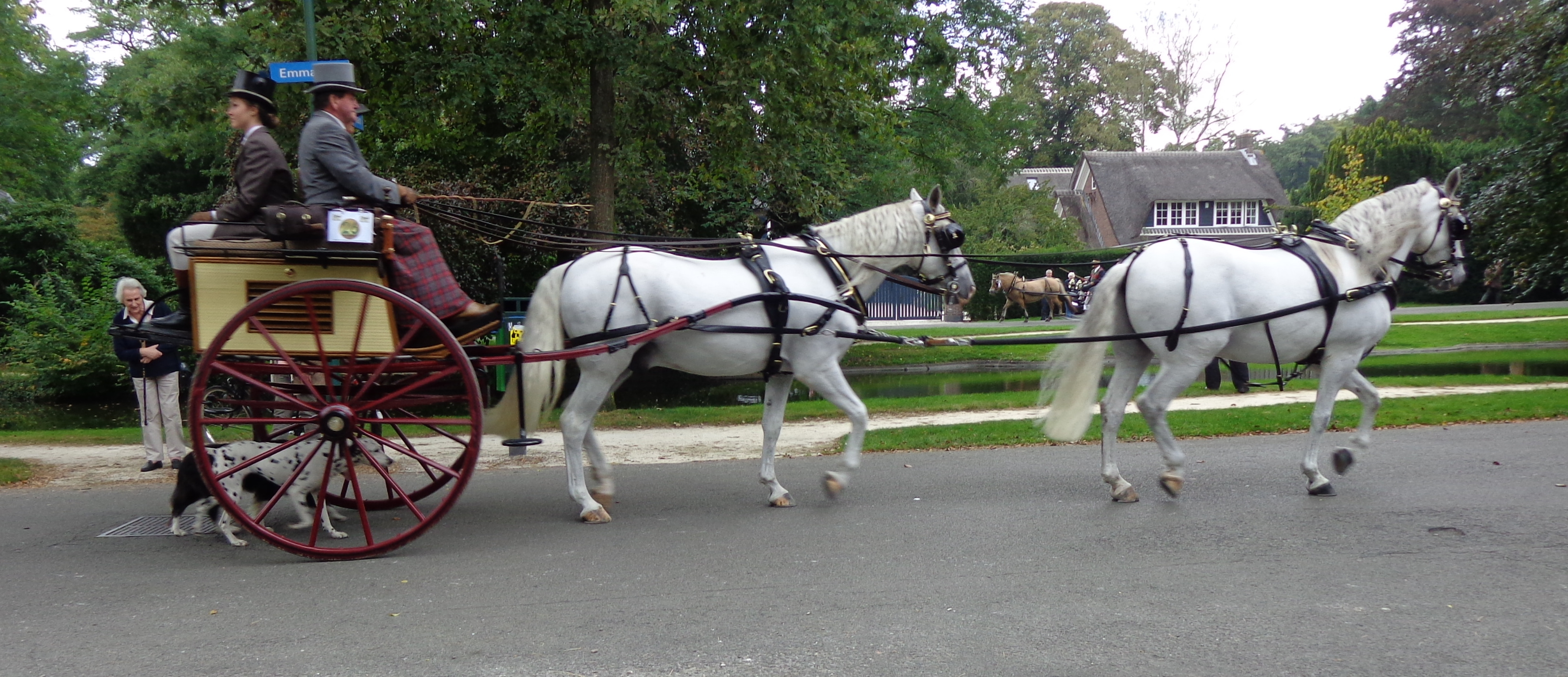 Nederlands Kampioenschap Traditioneel Gerij 2014 to Baarn